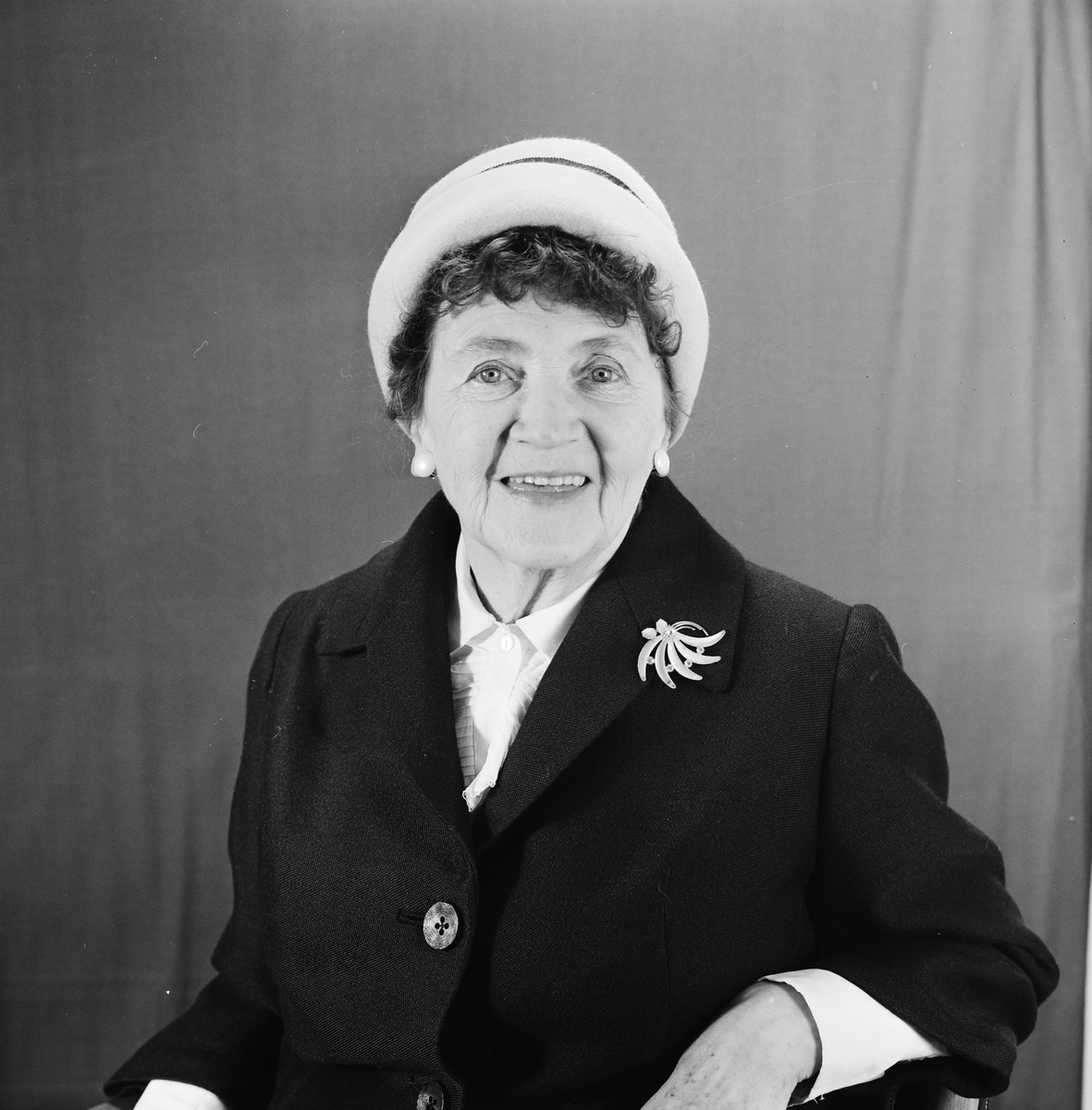 Gisken Wildenvey (1895?-1985) var en norsk forfatter.